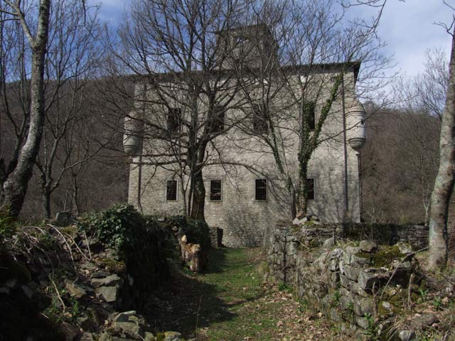 Gavedo, frazione di Mulazzo: Castello di Gavedo